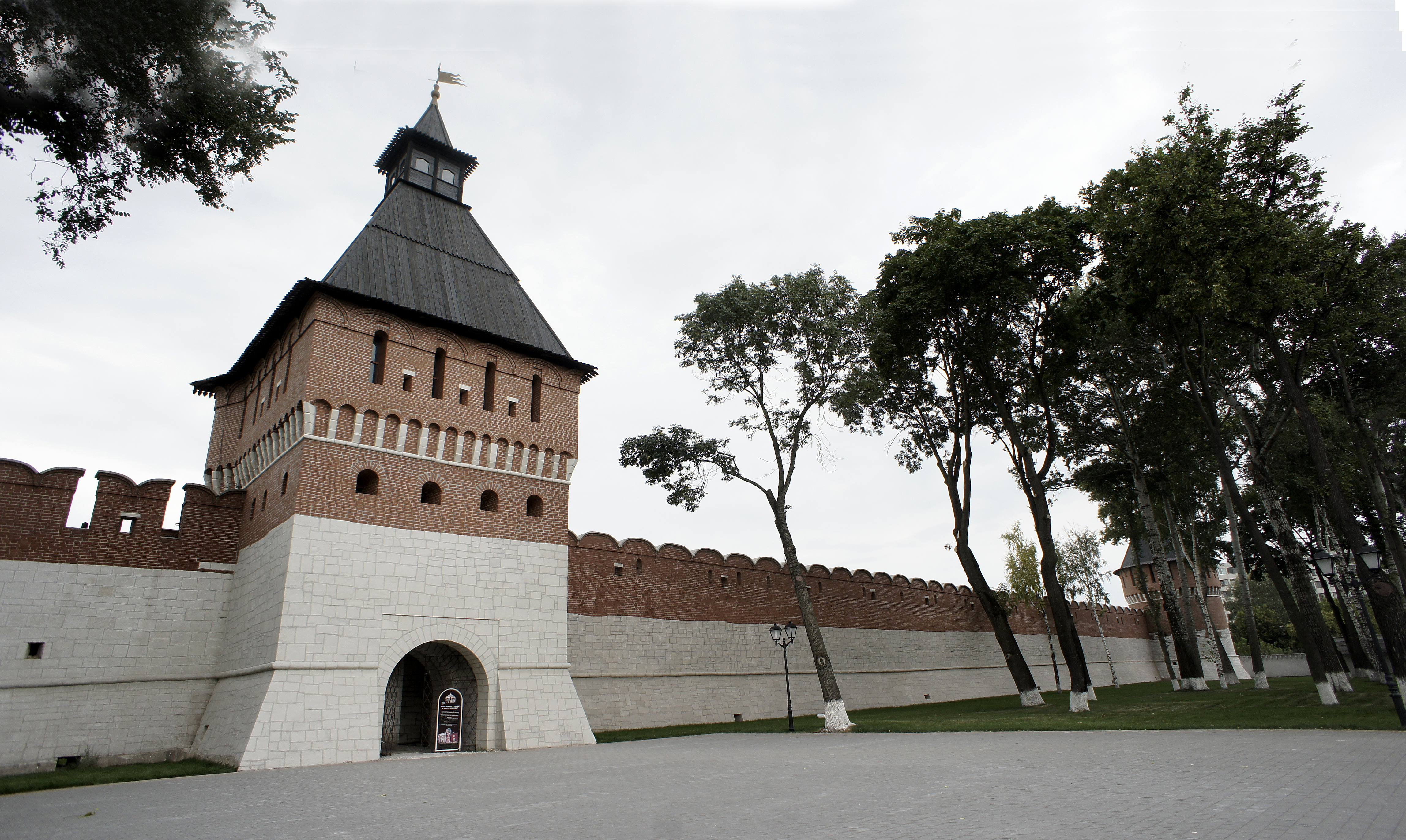 Башня Ивановских ворот: Кремль, Тула, Тульская область